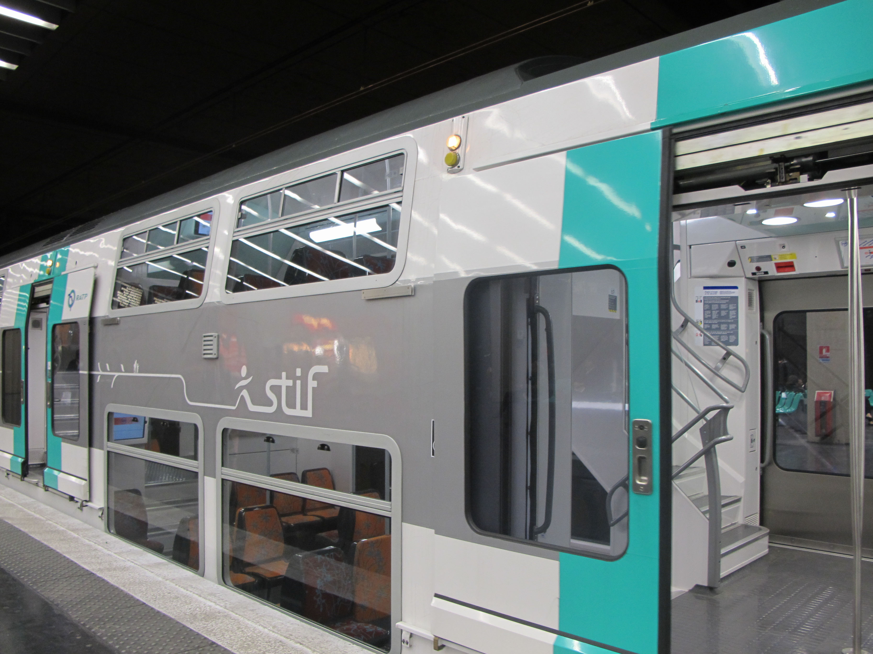 Rame MI09 du RER A, station La Défense, Ile de France. France